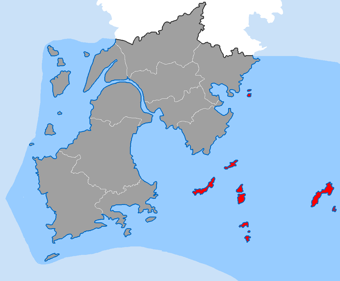 中文（中国大陆）: 鸡山乡在玉环市的位置